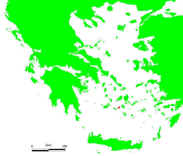 GR Sikinos.PNG (Greek island)